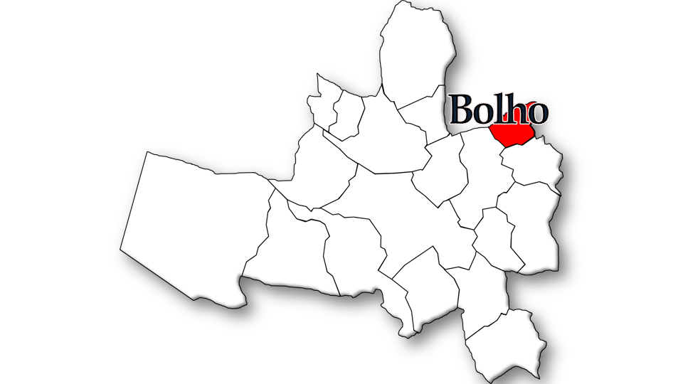 Português